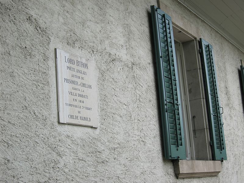 Marker an der Villa Diodati (Genf) zur Erinnerung des Aufenthalts von Byron 1816